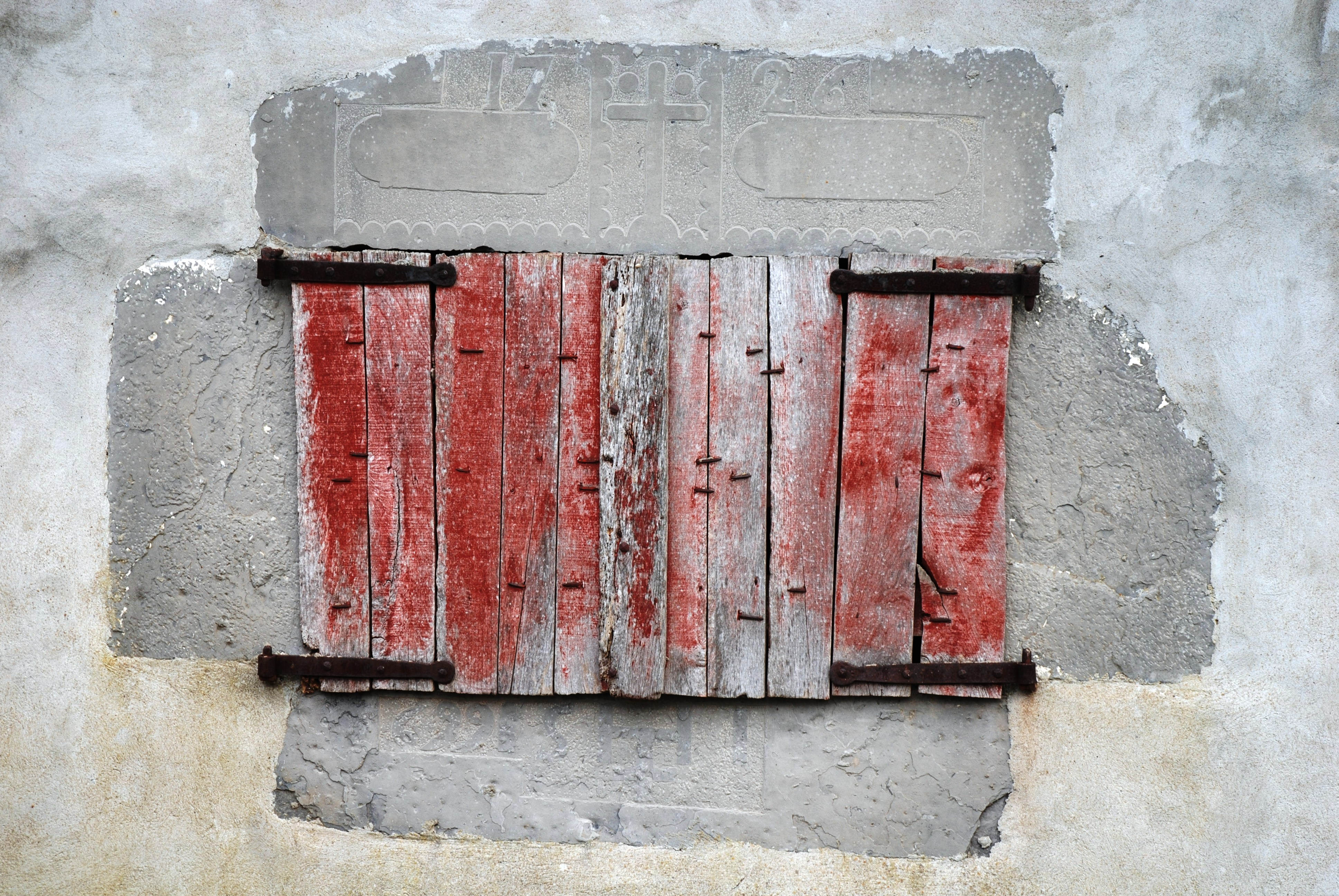 Iholdy, linteau sculpté